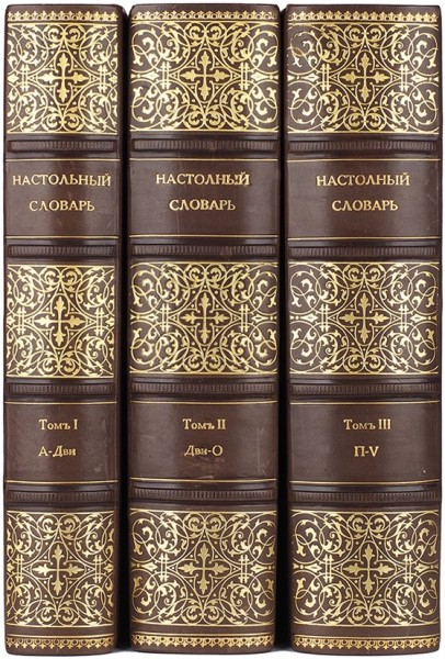 Настольный словарь для справок по всем отраслям знания. Составитель Феликс Густавович Толль.